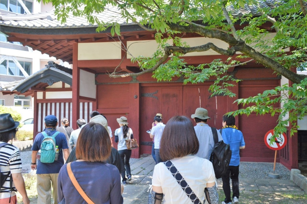 2017年7月8日に開催されたWikipedia Town in 飯田[1]のまちあるふ風景。